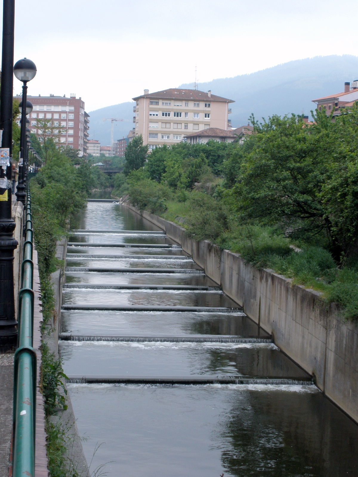 El Nervión a su paso por Llodio (Álava)